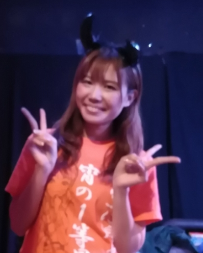 ２０１８年１０月１０日（水）新宿レッドノーズにて行われたBiRESCO定期ライブ、物販終了後行われた撮影会時に撮影した写真の中条智世さんの部分だけトリミングしたものです。